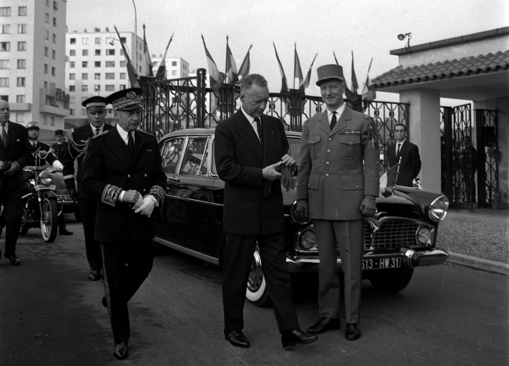 L'ENICA de Toulouse. Le 21 Octobre 1963. Vue de Pierre Messmer, ministre des Armées, en déplacement à Toulouse pour l'inauguration de l'ENICA.